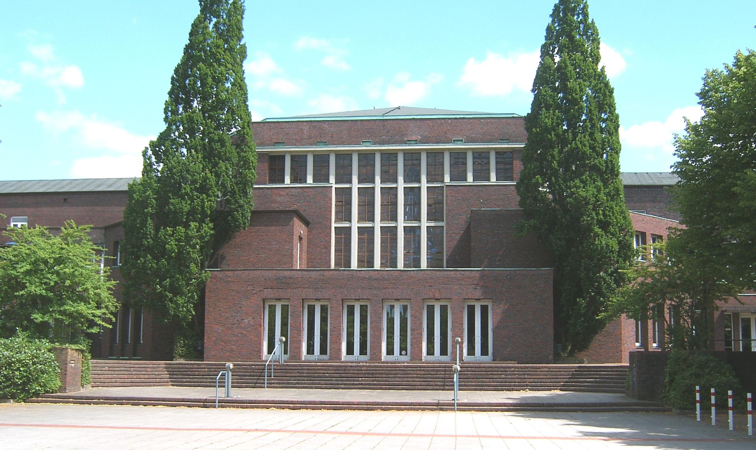 Bildbeschreibung: Hamburg, Heimfeld, Friedrich Ebert Halle Fotograf: selbst Datum: 14.07.2006